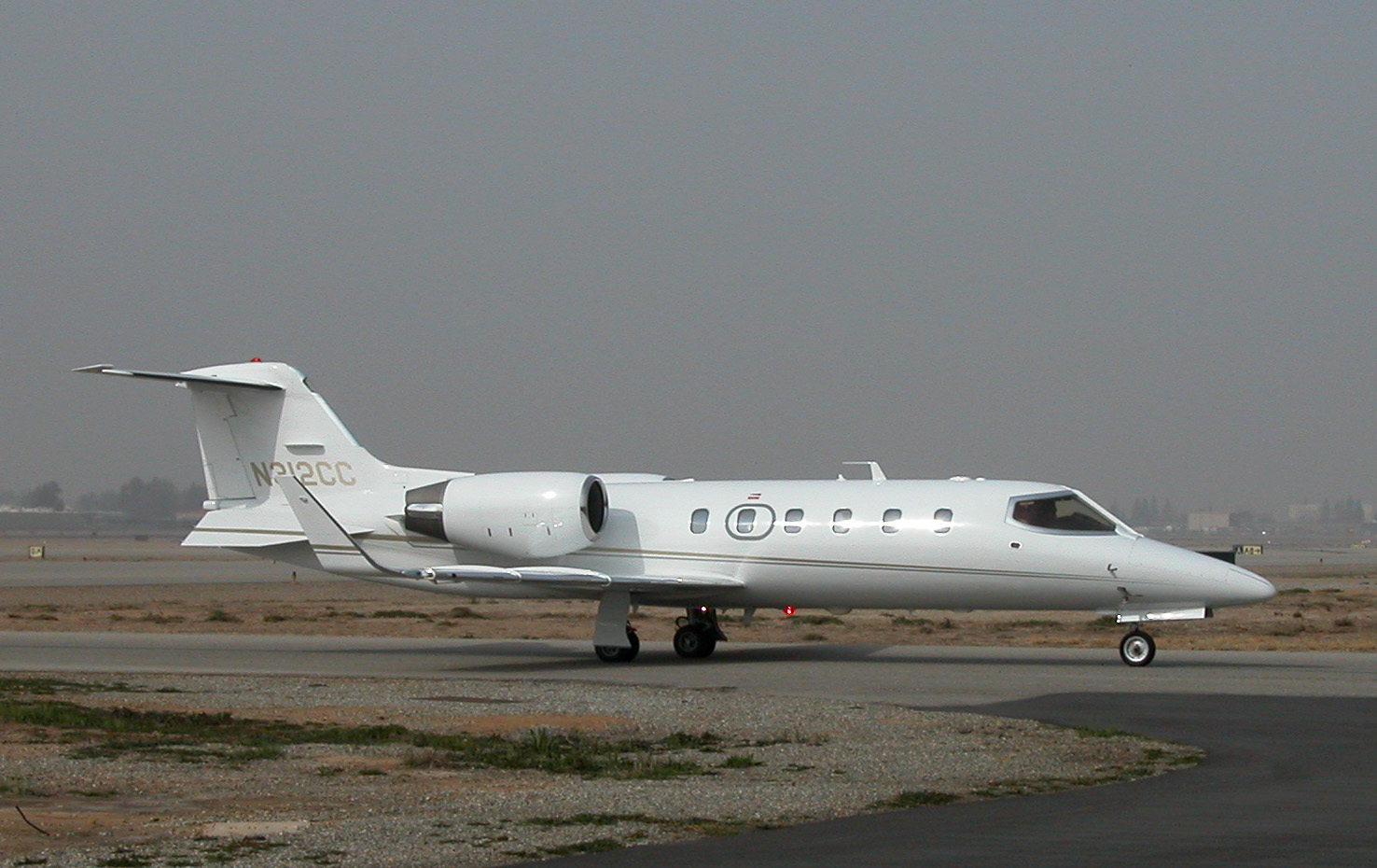 Learjet 31A (N312CC)